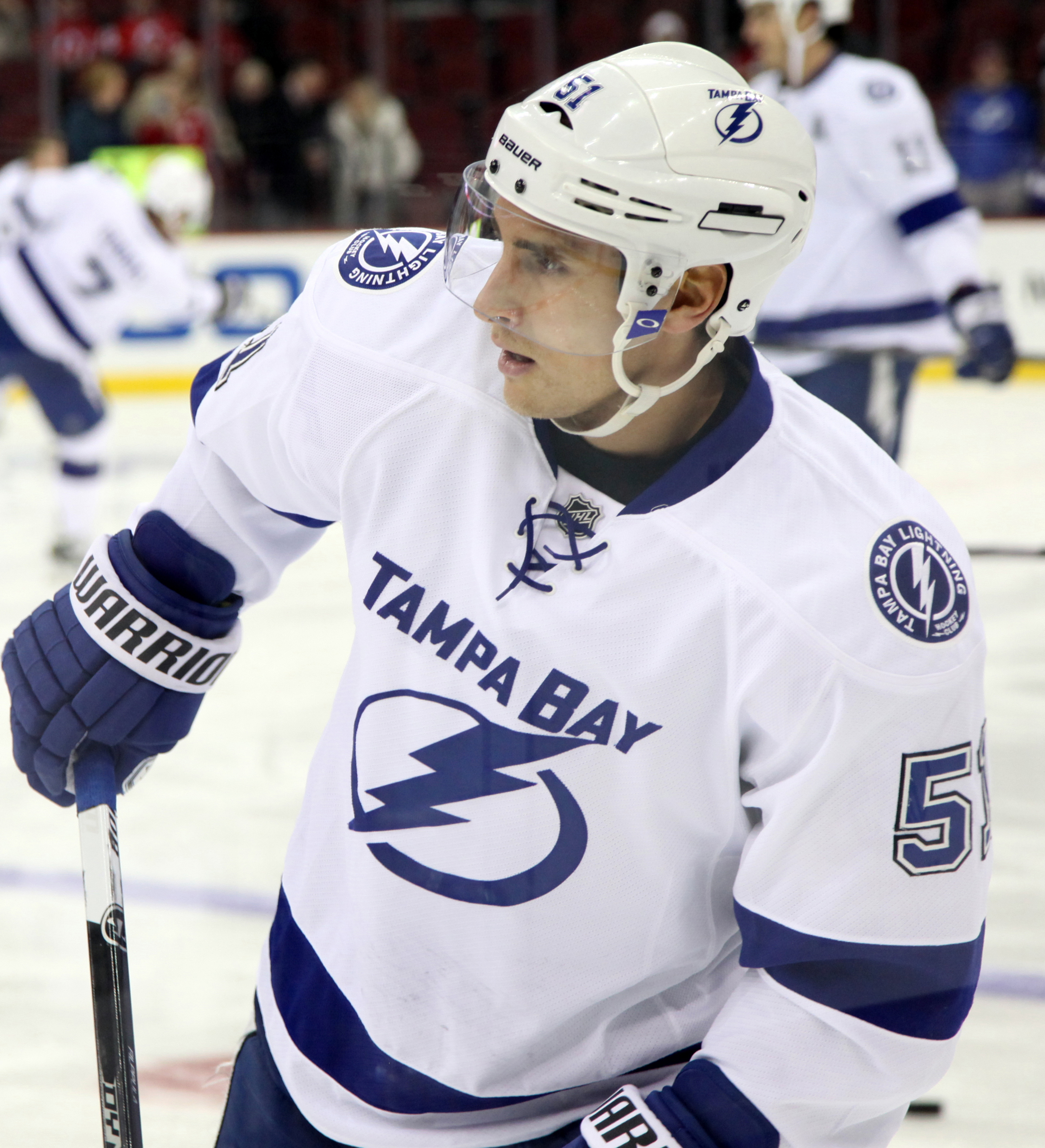 Valtteri Filppula in December 2014.